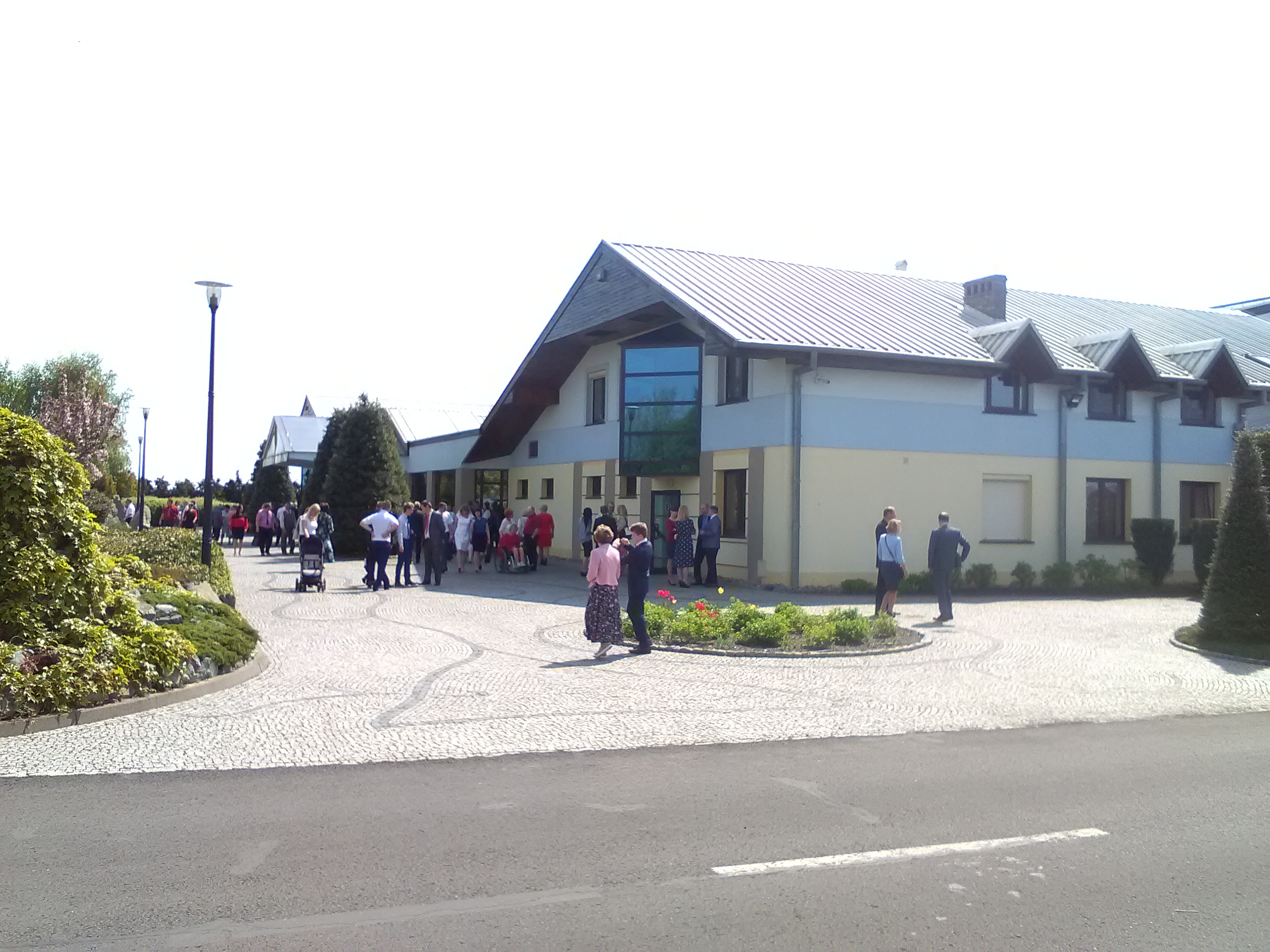 Sala zgromadzeń Świadków Jehowy w Łodzi koło Stęszewa.